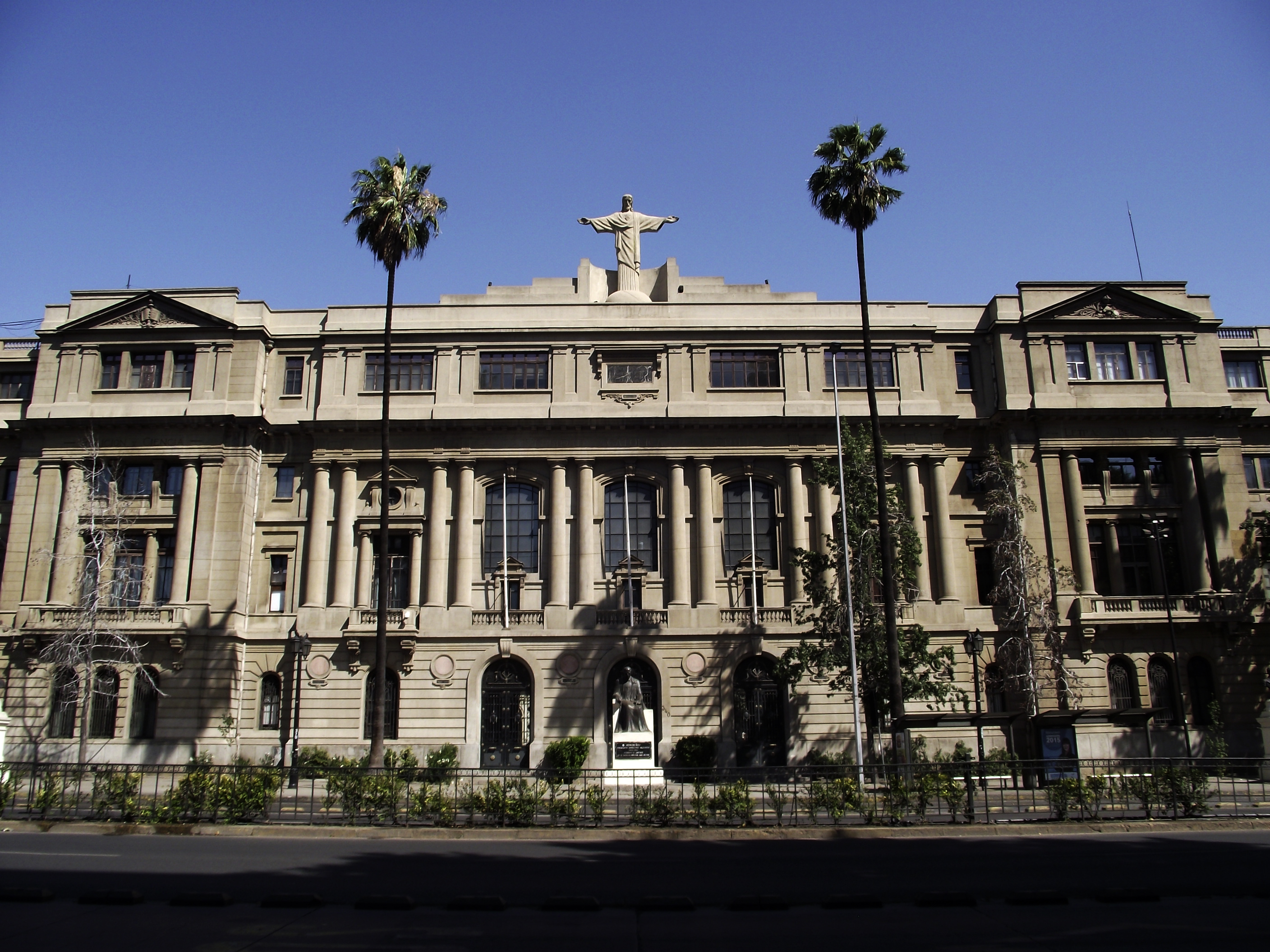 Frontis de la Casa Central de la Pontificia Universidad Católica de Chile, en Santiago